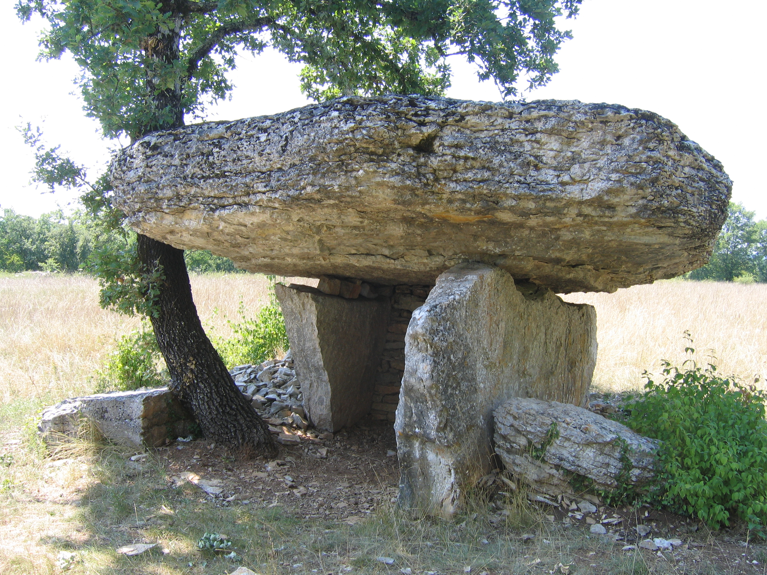 Description: Dolmen de Ferrières-Bas Lot, France Source: Hugo Soria Licence: GFDL Hugo Soria